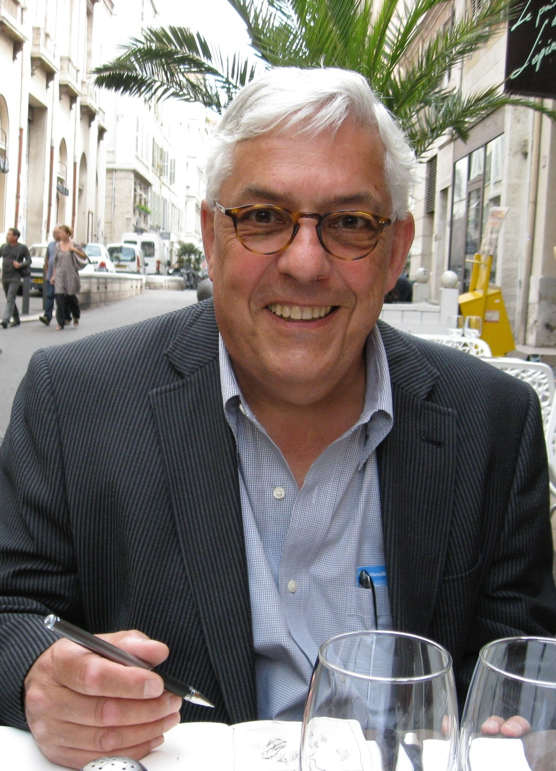 Marseilles, 2009